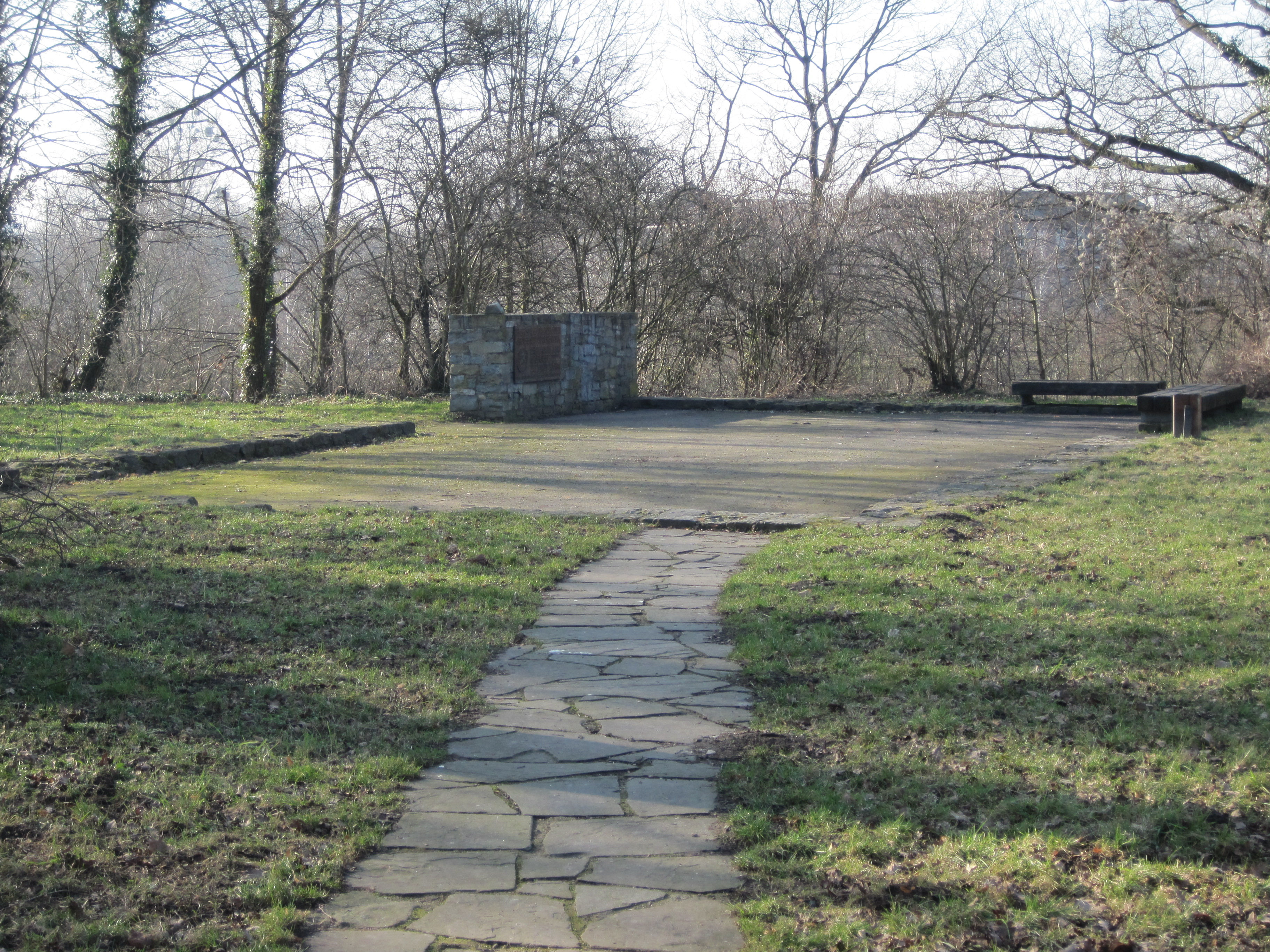 Das Foto zeigt eine Bodenmarkierung auf der Hauptburg des Burghügels in der Mark in Hamm. Diese markiert den früheren Standort des Palas von Burg Mark.